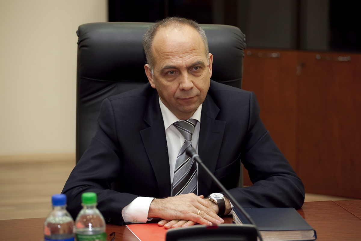 Петр Петрович Степанов - Председатель Правительства Приднестровской Молдавской Республики